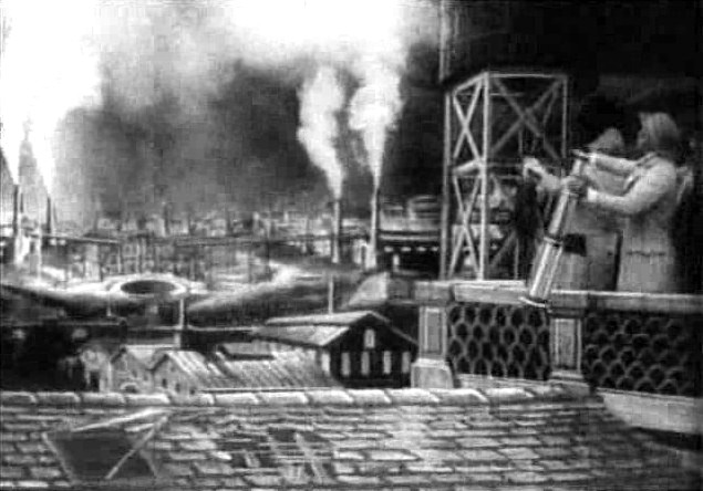 Méliès, viaggio nella luna (1902) 03